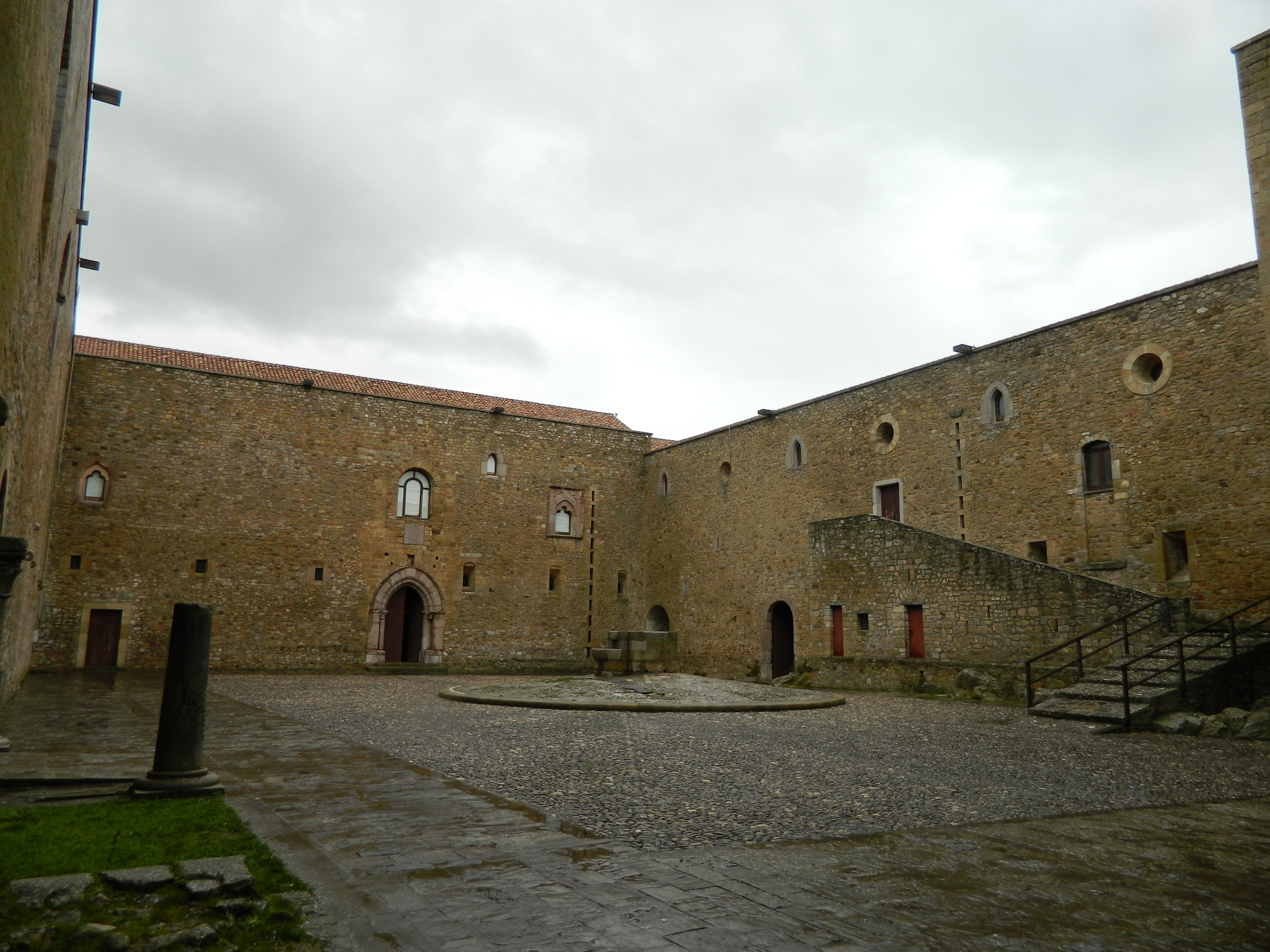 Castello di Lagopesole (Avigliano, PZ) - Il Cortile grande